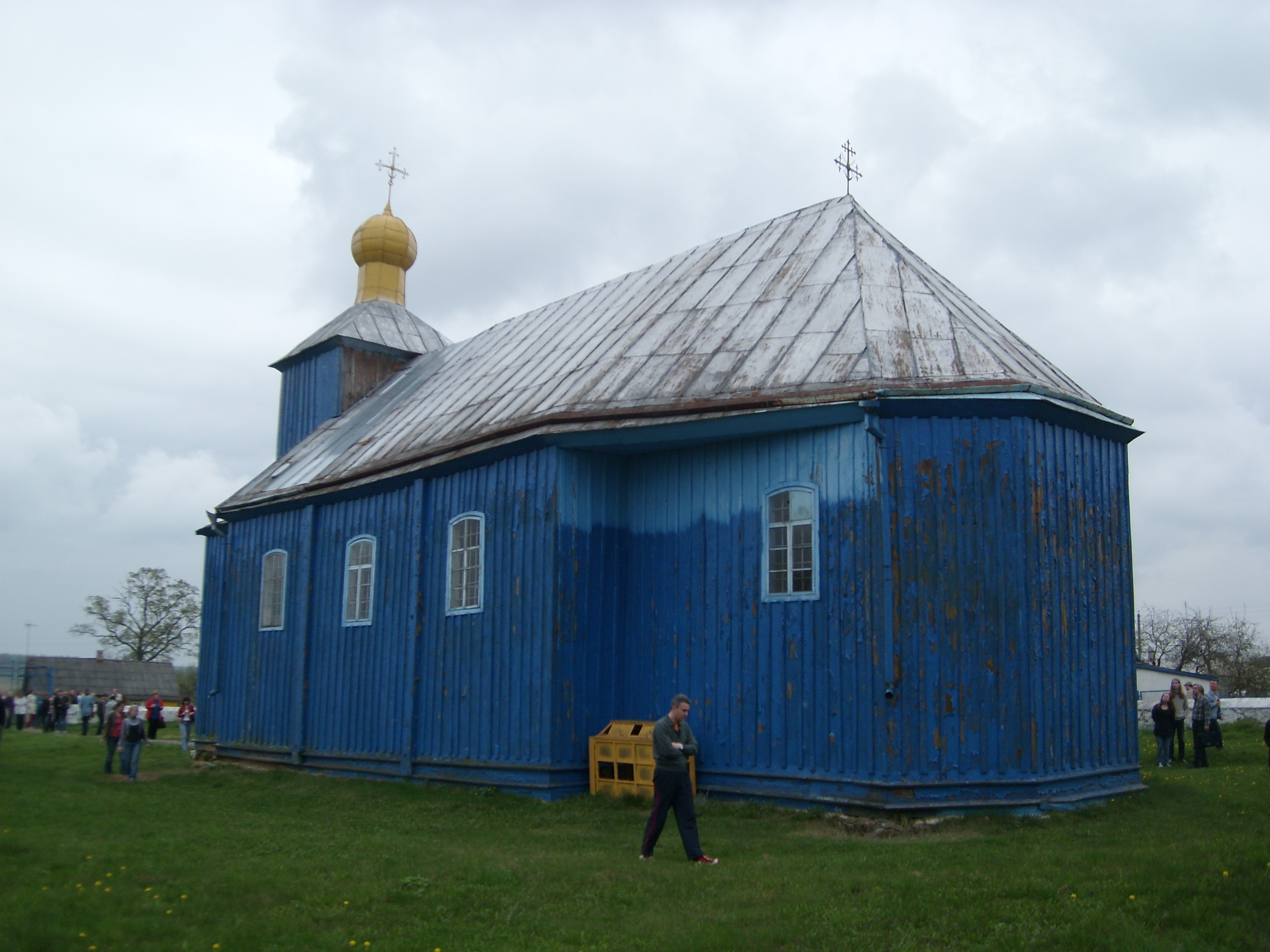 Беларуская (тарашкевіца): Царква Раства Багародзіцы. в. Голдава This is a photo of Belarusian heritage monument. Reference number: 413Г000352 ( WLM)